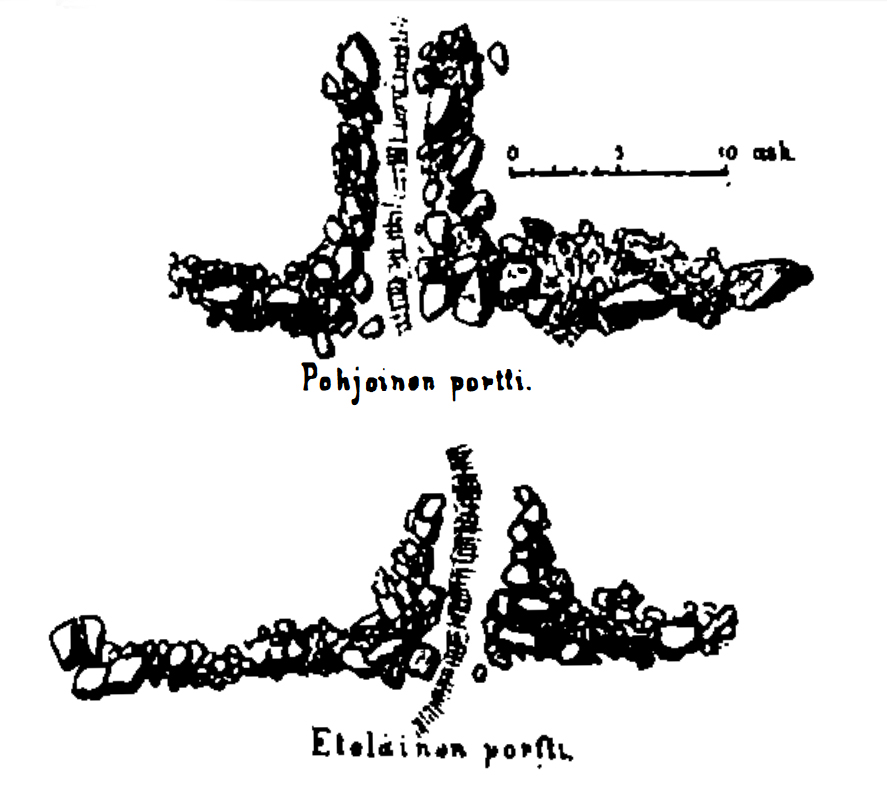 Hjalmar Appelgrenin havainnepiirros Mantereenlinnan porttivarustuksista